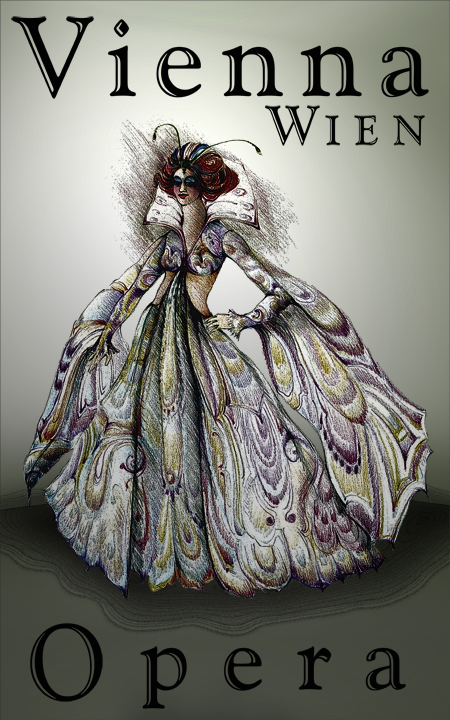 Opera Vienna, Poster,Bill